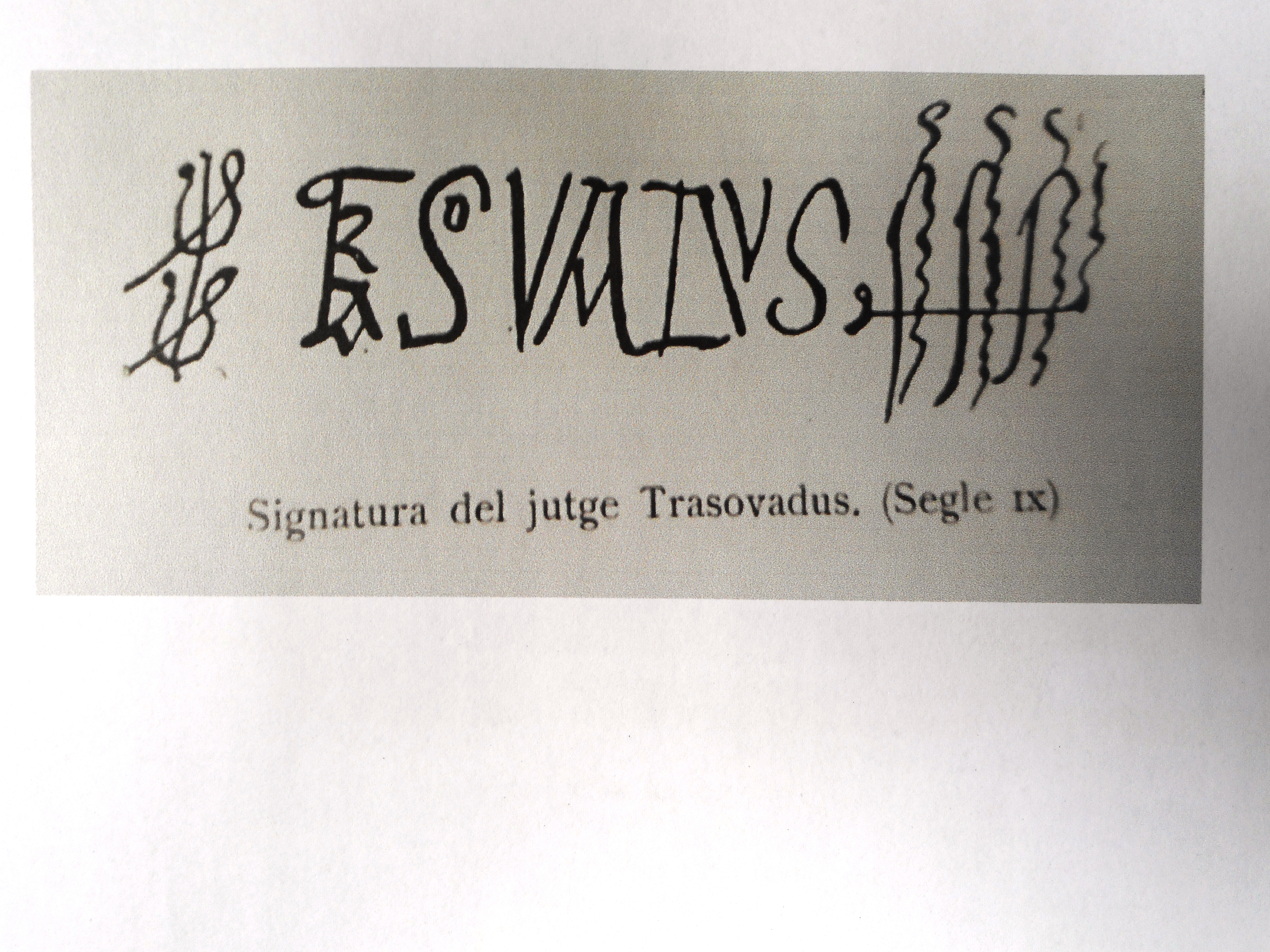 És la signatura d'un jutge famós del temps carolingi a Catalunya